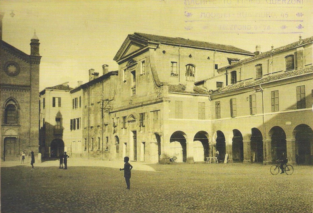 La chiesa sconsacrata delle mendicanti (ex chiesa di Santa Maria Bianca) negli anni 1920 situata in piaza del Duomo a Mirandola, prima di essere abbattuta per la realizzazione della caserma Mussolini (palazzo della Milizia - MSVN)